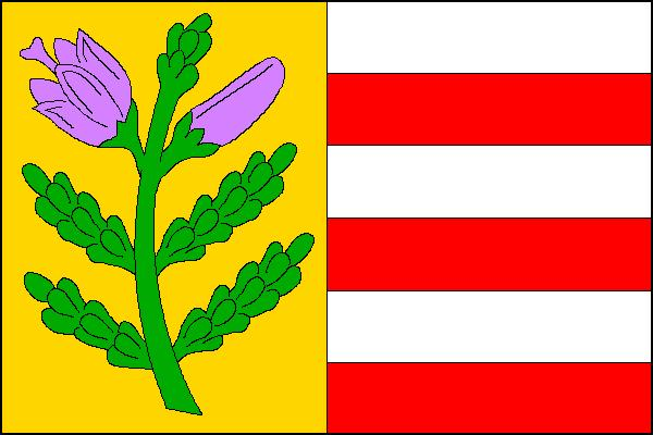 Vlajka obce Vřeskovice